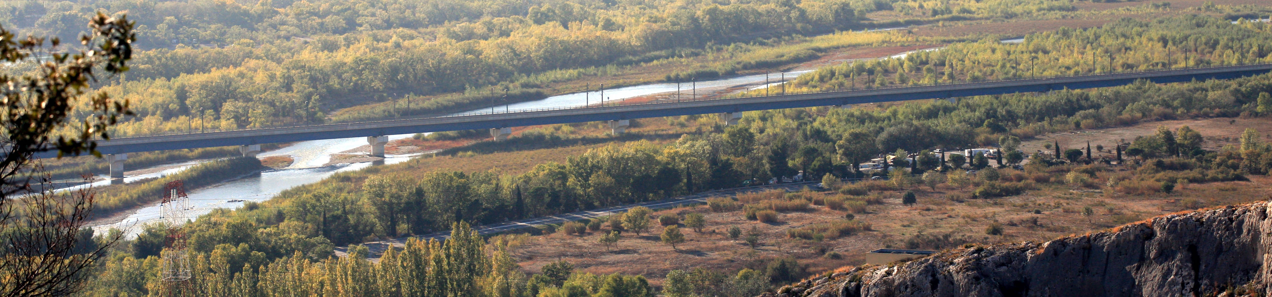 LGV traversant la Durance vers Cavaillon (84), France